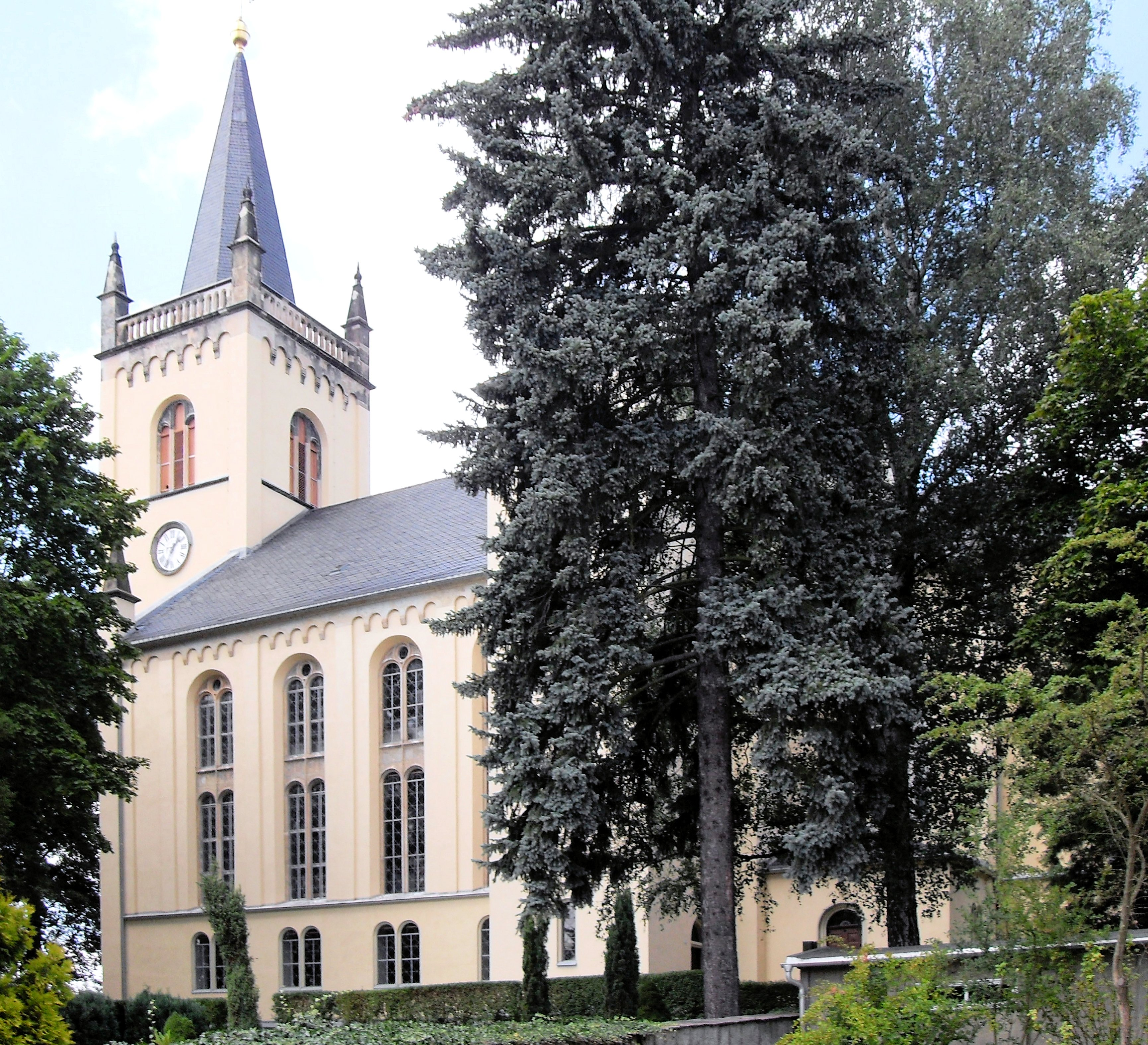 Südostseite der Kirche in Eppendorf, Landkreis Mittelsachsen